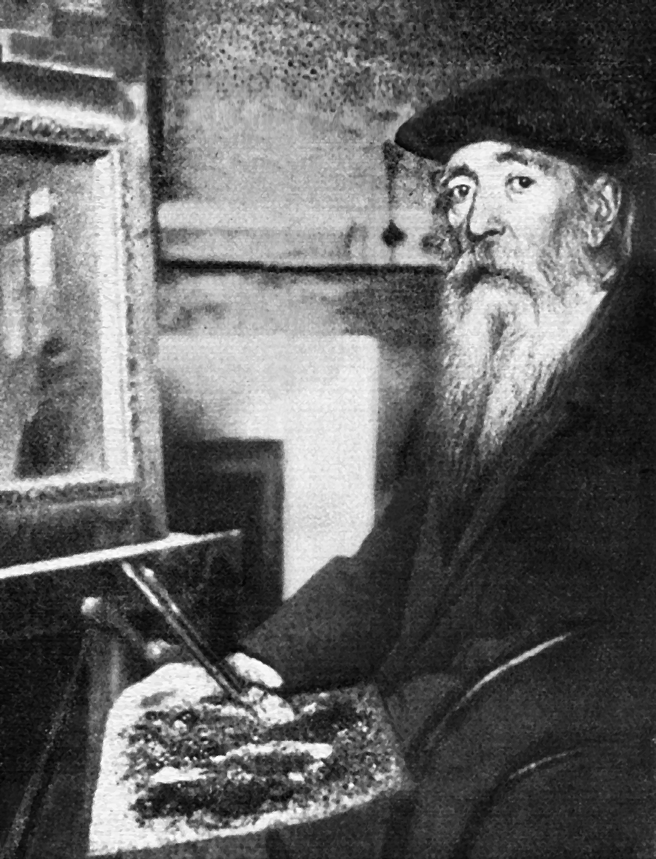 Léonard Jarraud âgé dans son "atelier" de La Couronne, Charente, France.